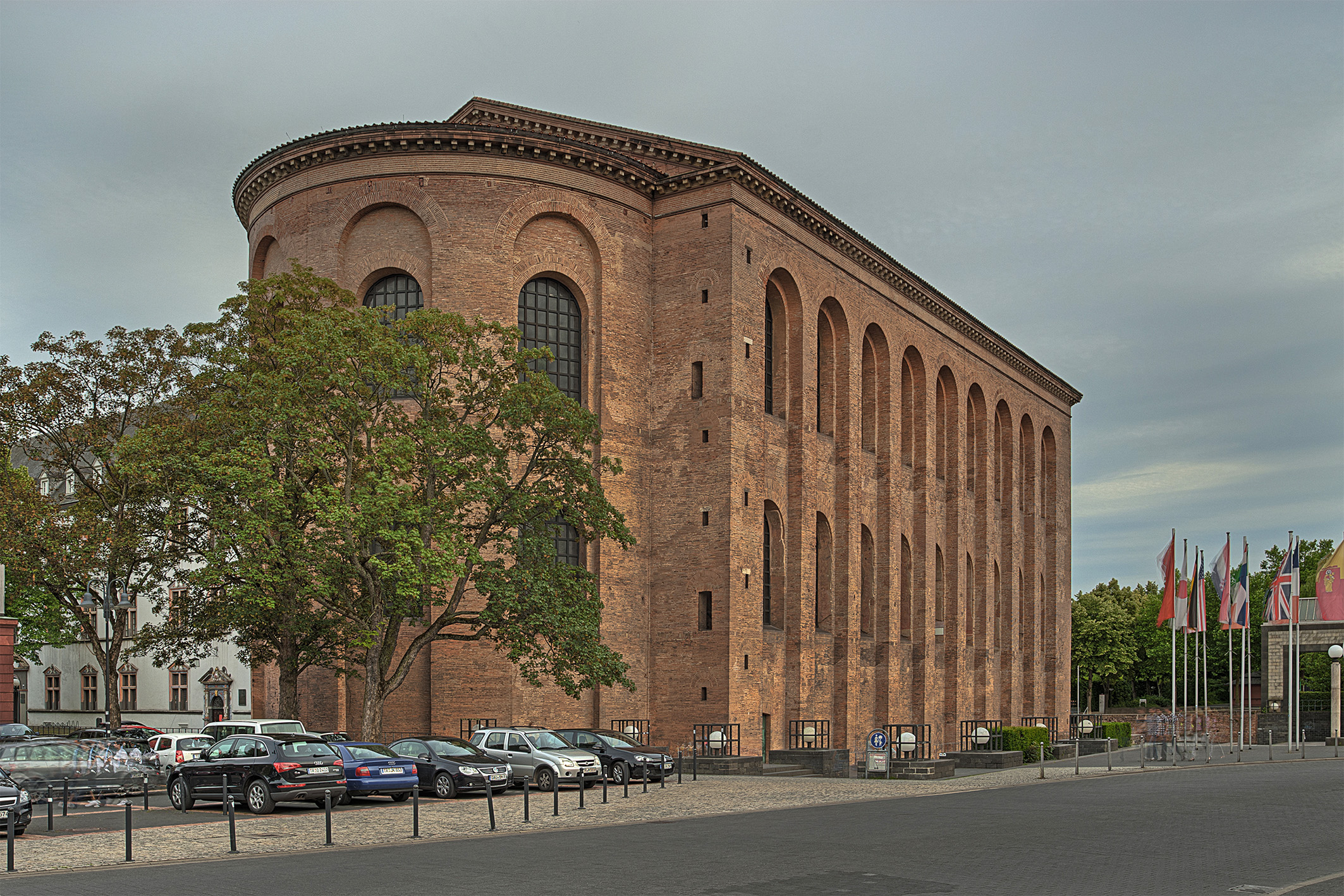 Erbaut im 4. Jhdt. nach Chr. als kaiserliche Empfangshalle Kaiser Konstantins des Großen. Abbruch der Ost- und Südwand bei Errichtung des kurfürstlichen Schlosses im 17. Jhdt. Wiederhergestellt 1856, seither genutzt als Evangelische Pfarrkirche (Erlöserkirche). Nach Beschädigungen im 2. Weltkrieg Restaurierungsarbeiten im Jahre 1956 abgeschlossen.